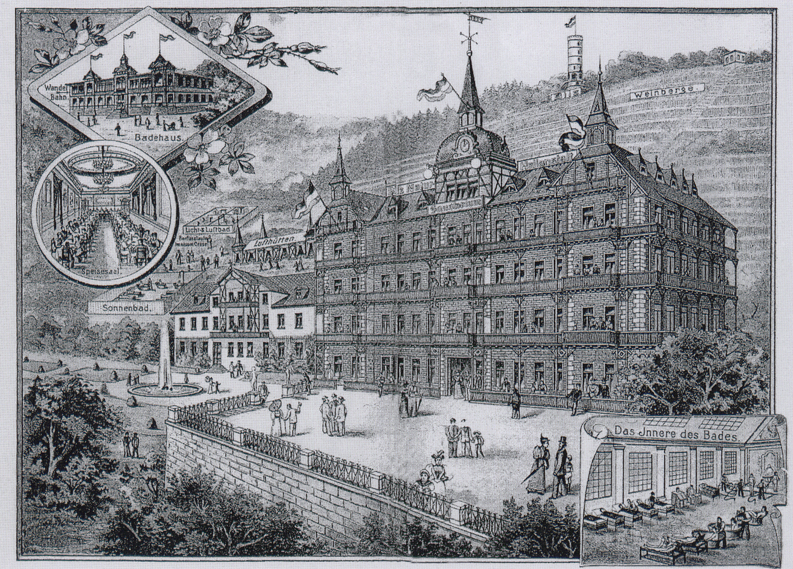 Illustration des Bilz-Sanatoriums 1897, im Vordergrund Schloss Lössnitz (Kurhaus II), links Kurhaus I, oben auf dem Berg der Mäuseturm